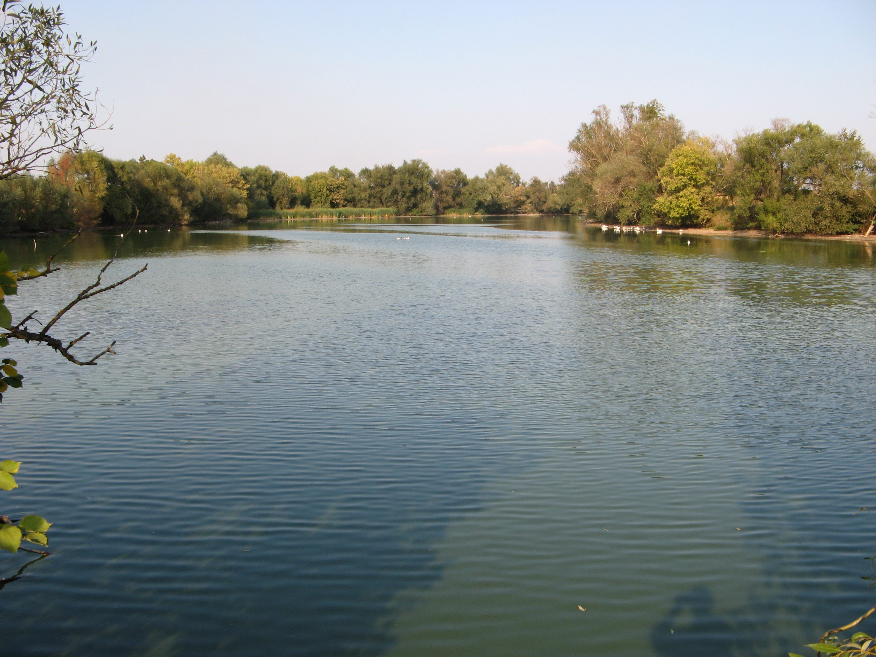 Село Шаповалівка (Конотопський р-н). Ставок на притоці Кукілки.